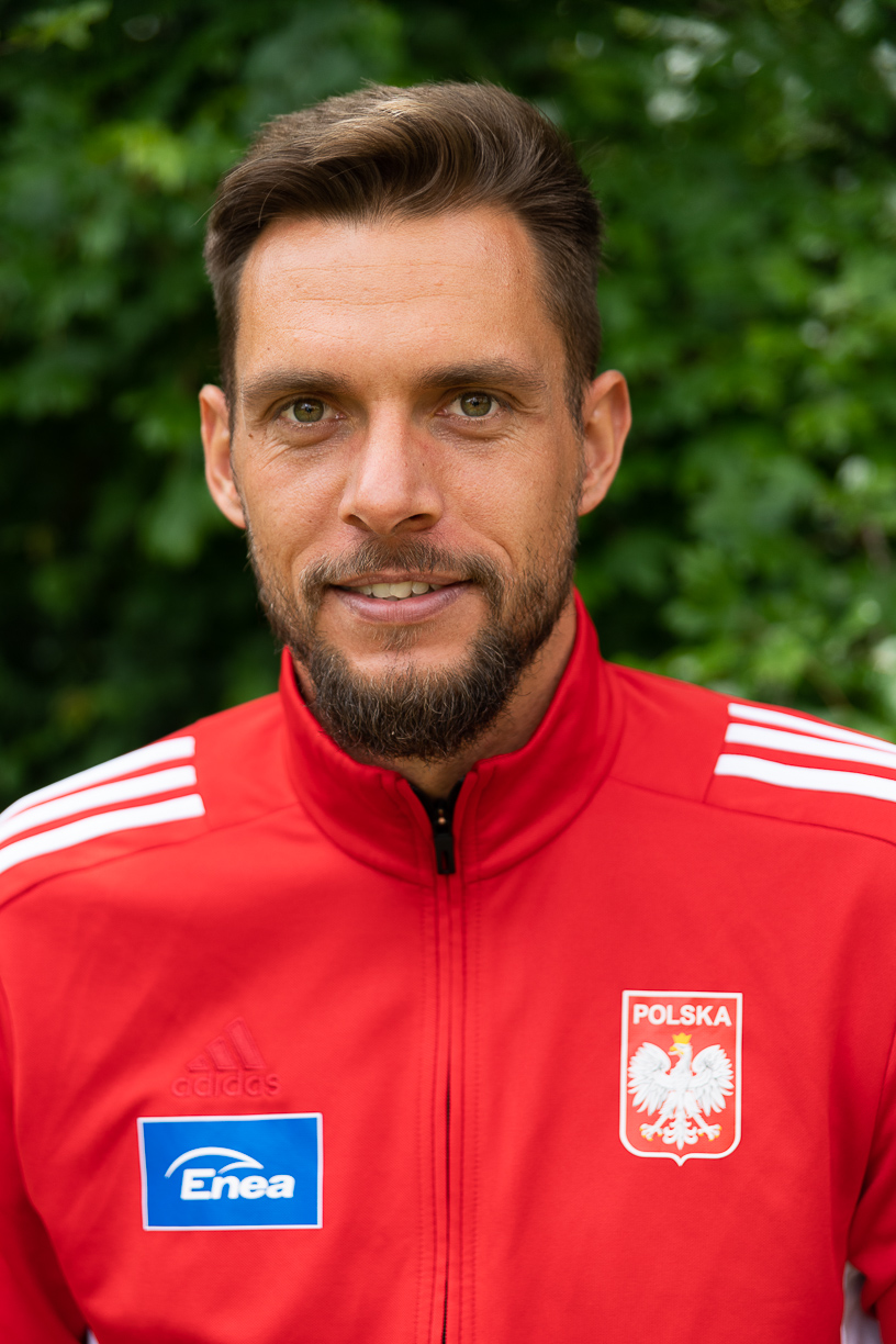 Polski wioślarz Marcin Brzeziński 2019